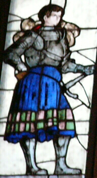 Ausschnitt aus dem Markgrafenfenster von St. Sebald in Nürnberg: Markgraf Wilhelm